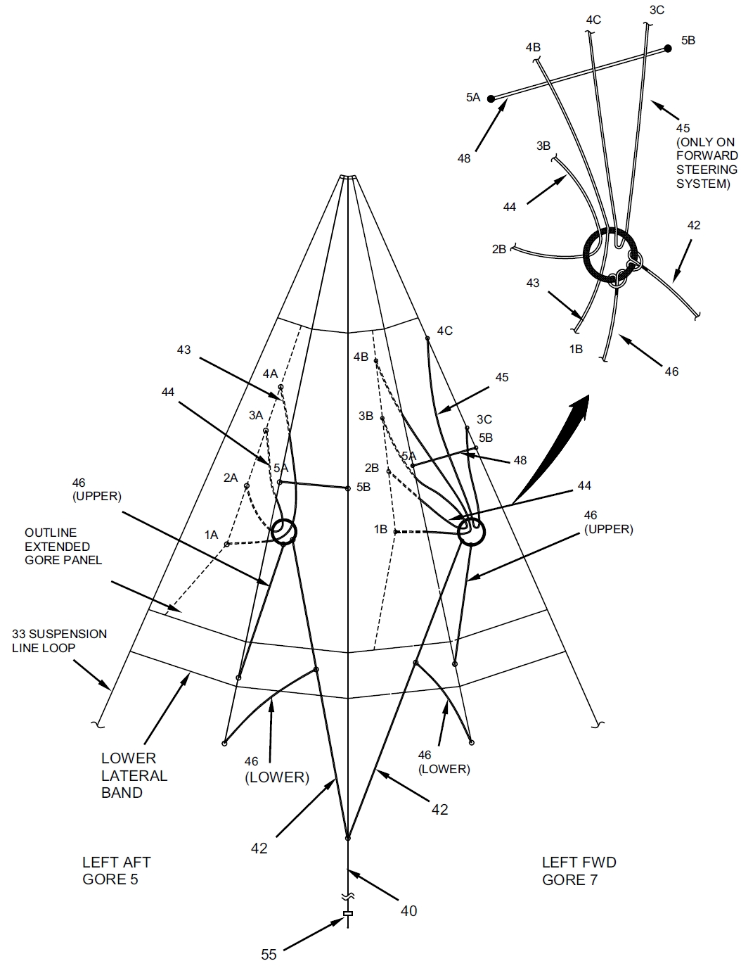 Prinzipzeichnung des Steuerleinensystems von einer Seite der Hauptkappe aus dem Technical Manual.